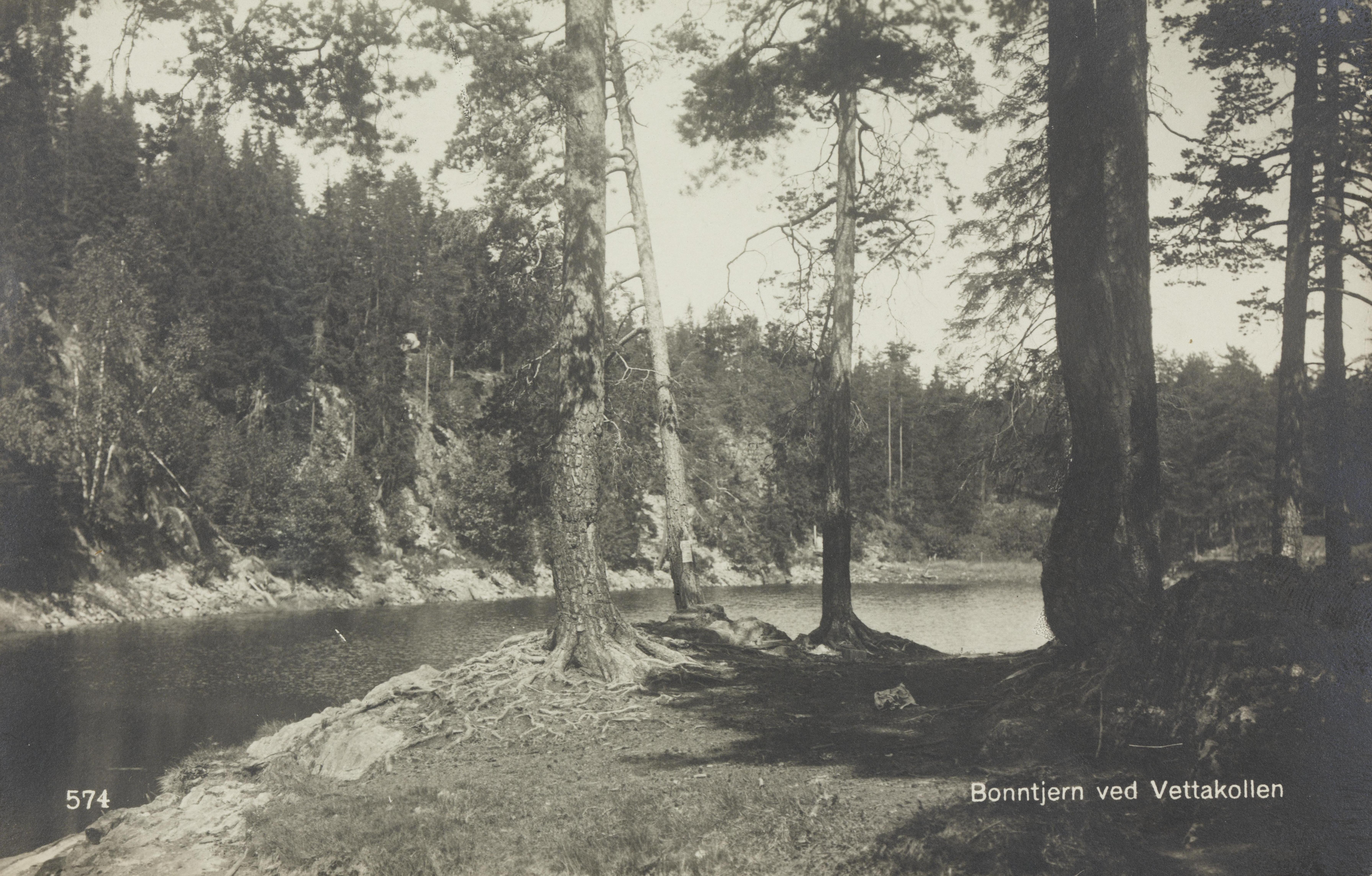 Bildet er hentet fra Nasjonalbibliotekets bildesamling Bånntjern,Vettakollen, Oslo, Oslo